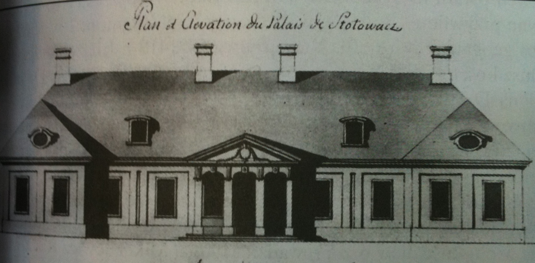 Nieistniejący barokowy dwór z XVIII wieku z dwoma bocznymi ryzalitami od frontu, który zaprojektował prawdopodobnie Jan Henryk Klemm z Saksonii. Obok znajdowała się stadnina koni hetmana Branickiego.